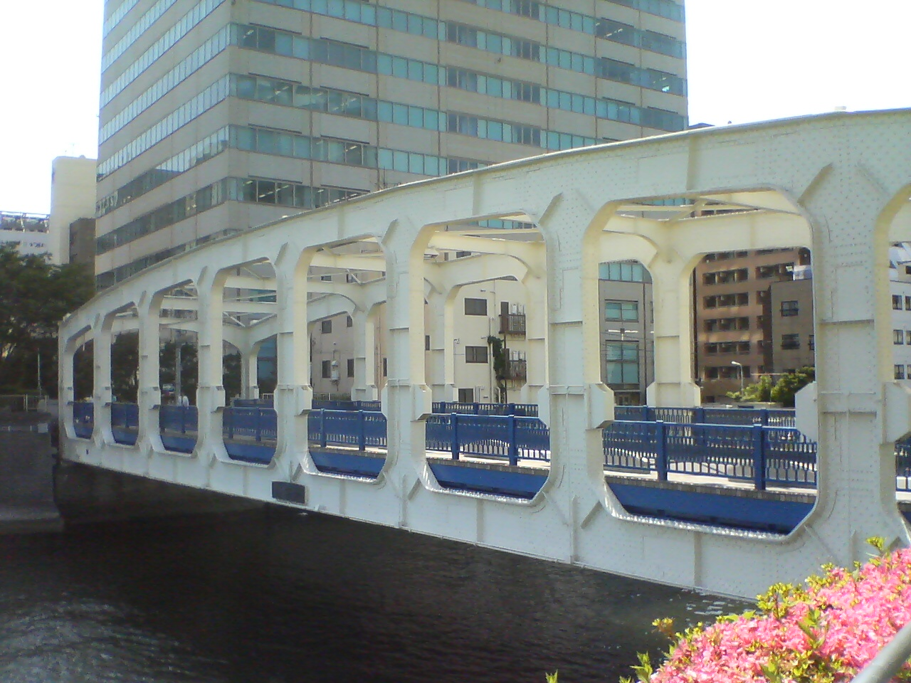 豊海橋（日本橋川）